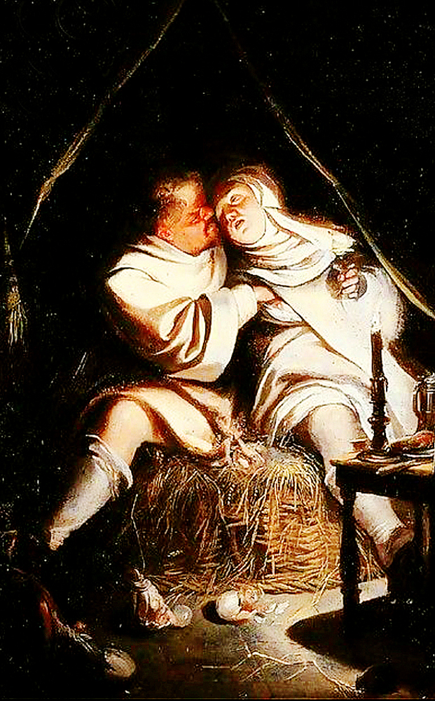 Moine séduisant une nonne, école hollandaise du sud XVIIIe